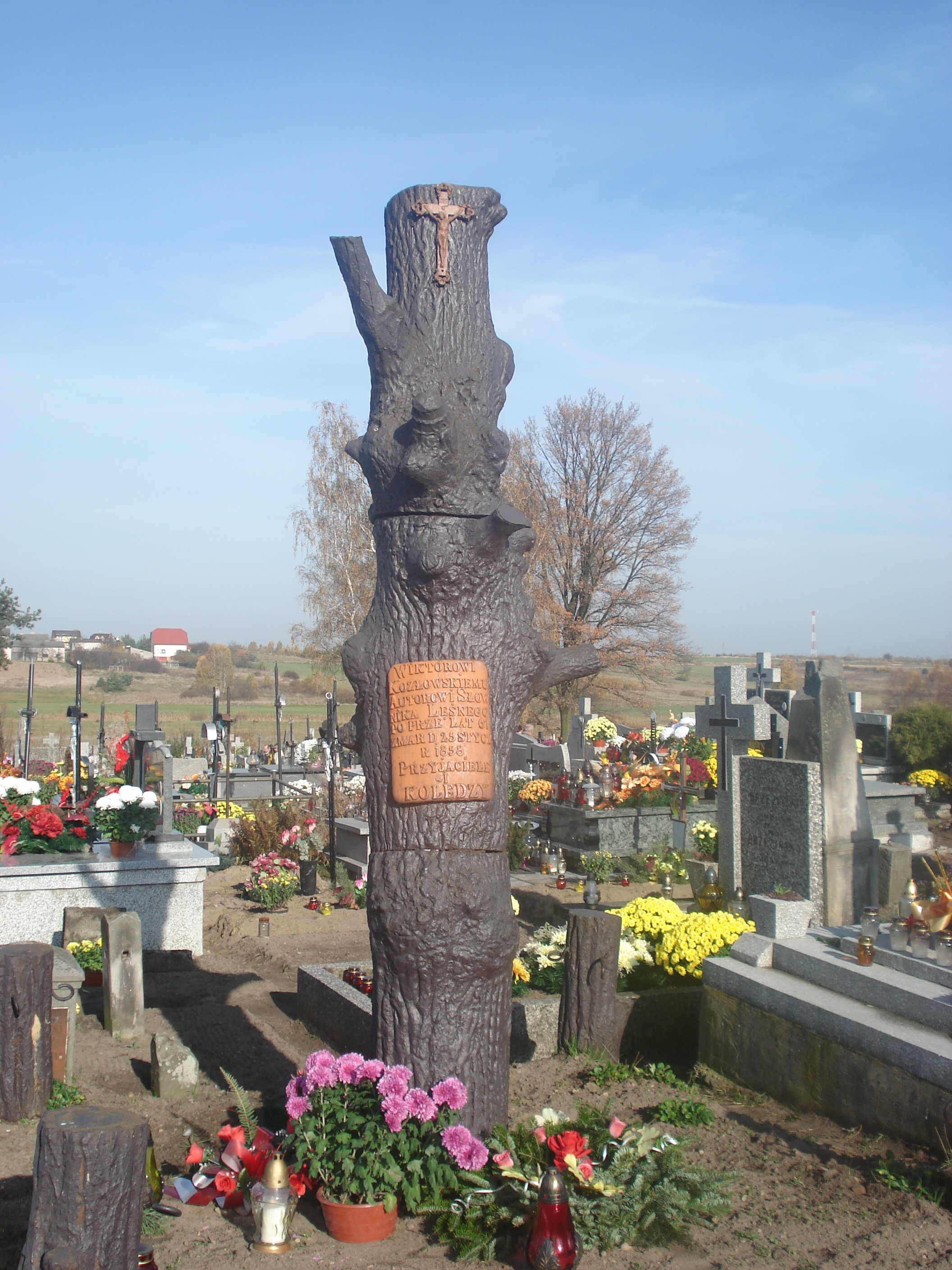 Nagrobek Wiktora Kozłowskiego w Chlewiskach.